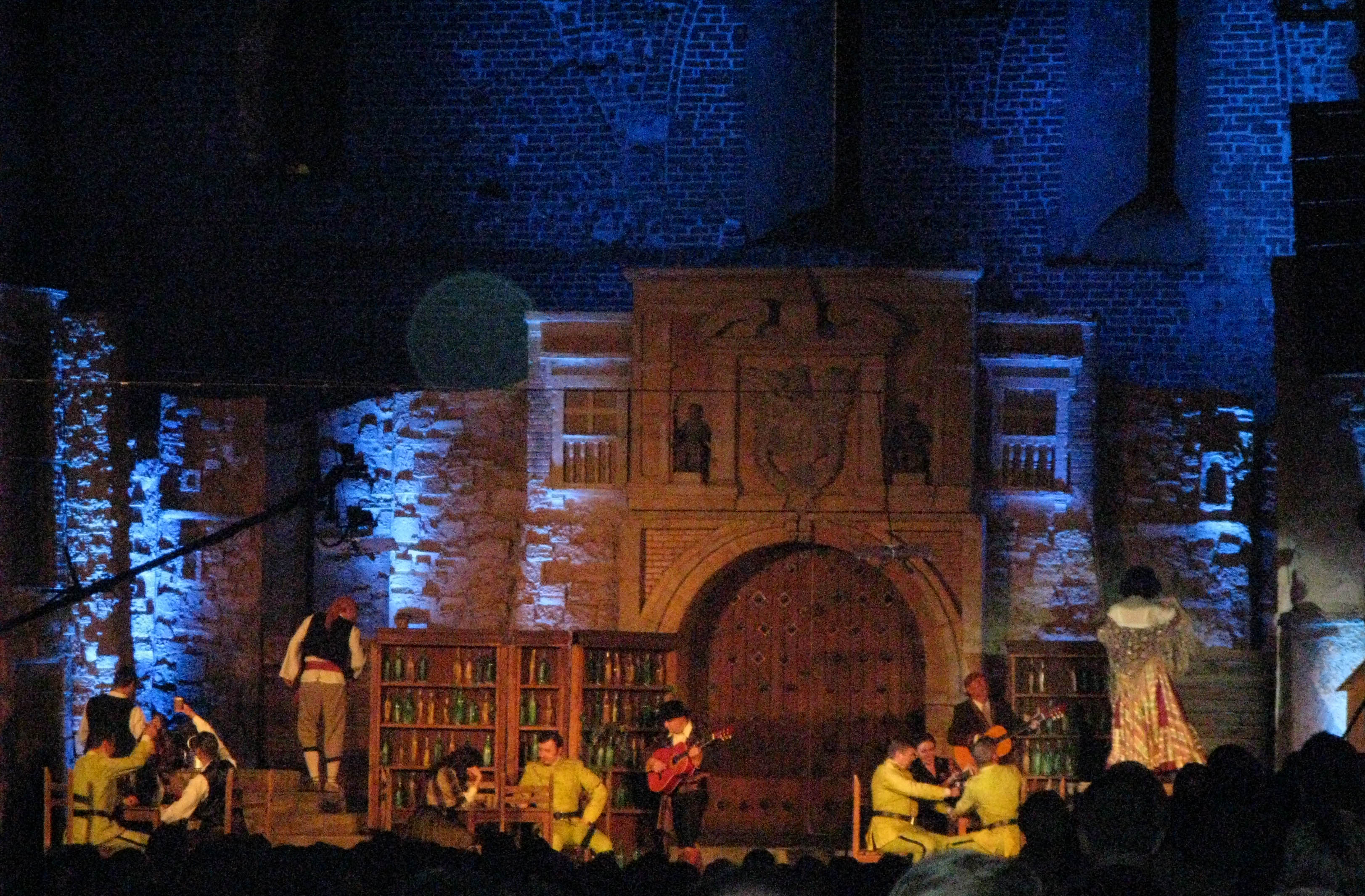 Carmen w wykonaniu Opery Nova - spektakl plenerowy w Fosie Zamkowej w Toruniu